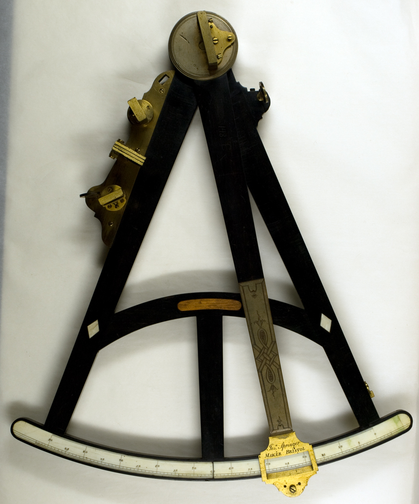 Oktant aus Ebenholz mit Messingbeschlägen, Messingschrauben sowie Elfenbeinplatten- Einlagen. Dieser größere Oktant hat ein Diopter mehr. Die Inderspiegel, die kleineren Reflexspiegel mit den nur halb amalgamierten Glasscheiben, die zwischen reflex- und Inderspigel angebracht hell und dunkel gefärbten Blendgläser, sind sämtlich in Messing gefasst. Die Alhidade mit eingravierten Rokoko- und Bandwerkornamenten verziert, besteht aus Messing. Die in den Kreissektor des Oktanten eingelegte Elfenbeinskala besteht aus zwei Stücken. Bezeichnet mit "Jos a, Springer / MAKER BRISTOL".